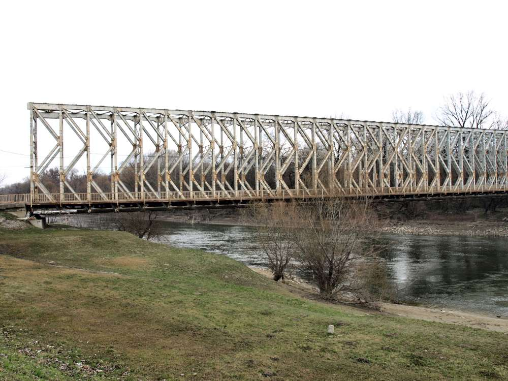 Budapest, (K-híd) Óbudai-sziget